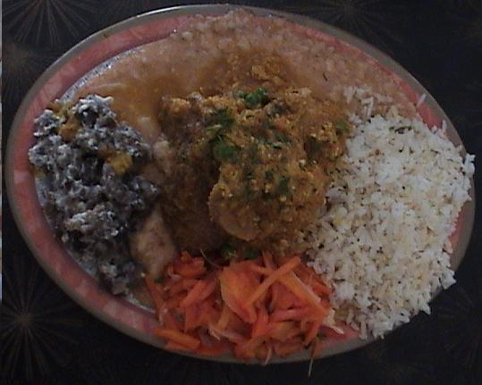 Plato tradicional de Punata preparado en base a ajies rojo y amarillo; carne de: pollo, cordero, y lengua de vaca; rosquete molido; arroz, chuño; papa y ensalada. El nombre tiene origen en la época colonial porque los ajies necesarios para su preparación se traían desde el Cuzco.